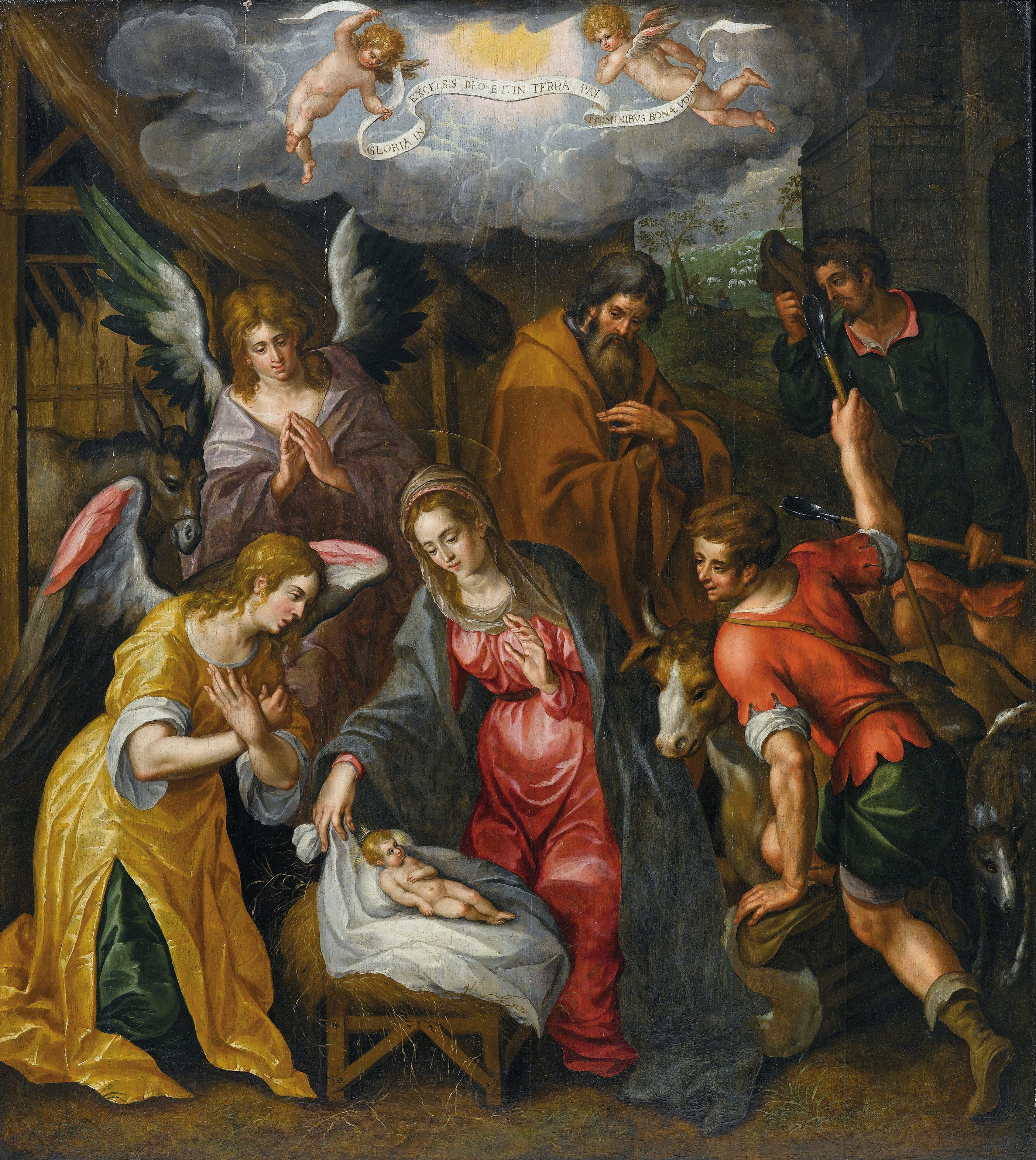 Die Geburt Christi, Öl auf Holz, 134,5 x 122 cm